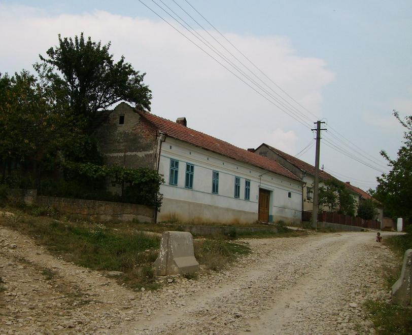 Svatá Helena v Banátu